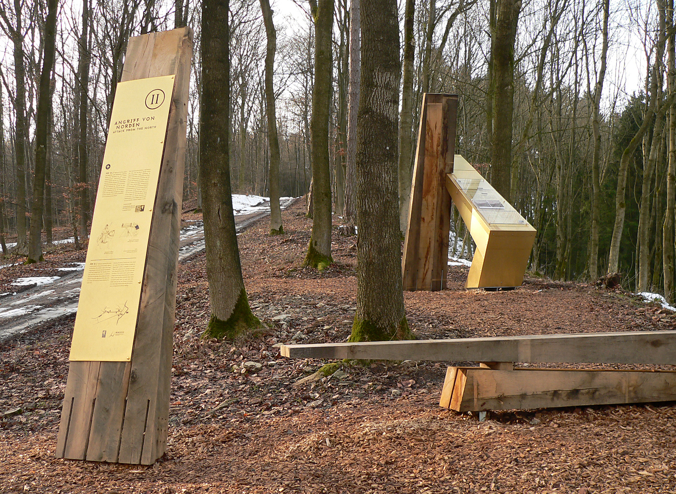 Harzhorn mit Infostelen an Rundgang